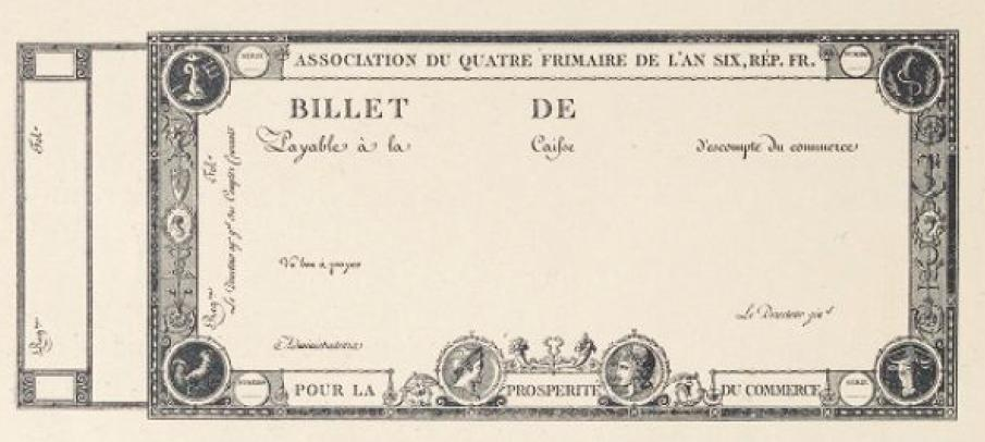 Billet de la Caisse d'escompte du commerce, association du 4 frimaire de l'An 6 [24 novembre 1797], dessin de Charles Monnet, gravé par Jean Duplessis-Bertaux.